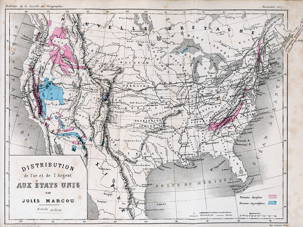 Carte de Jules Marcou publiée en 1867 dans le bulletin de la société de géographie